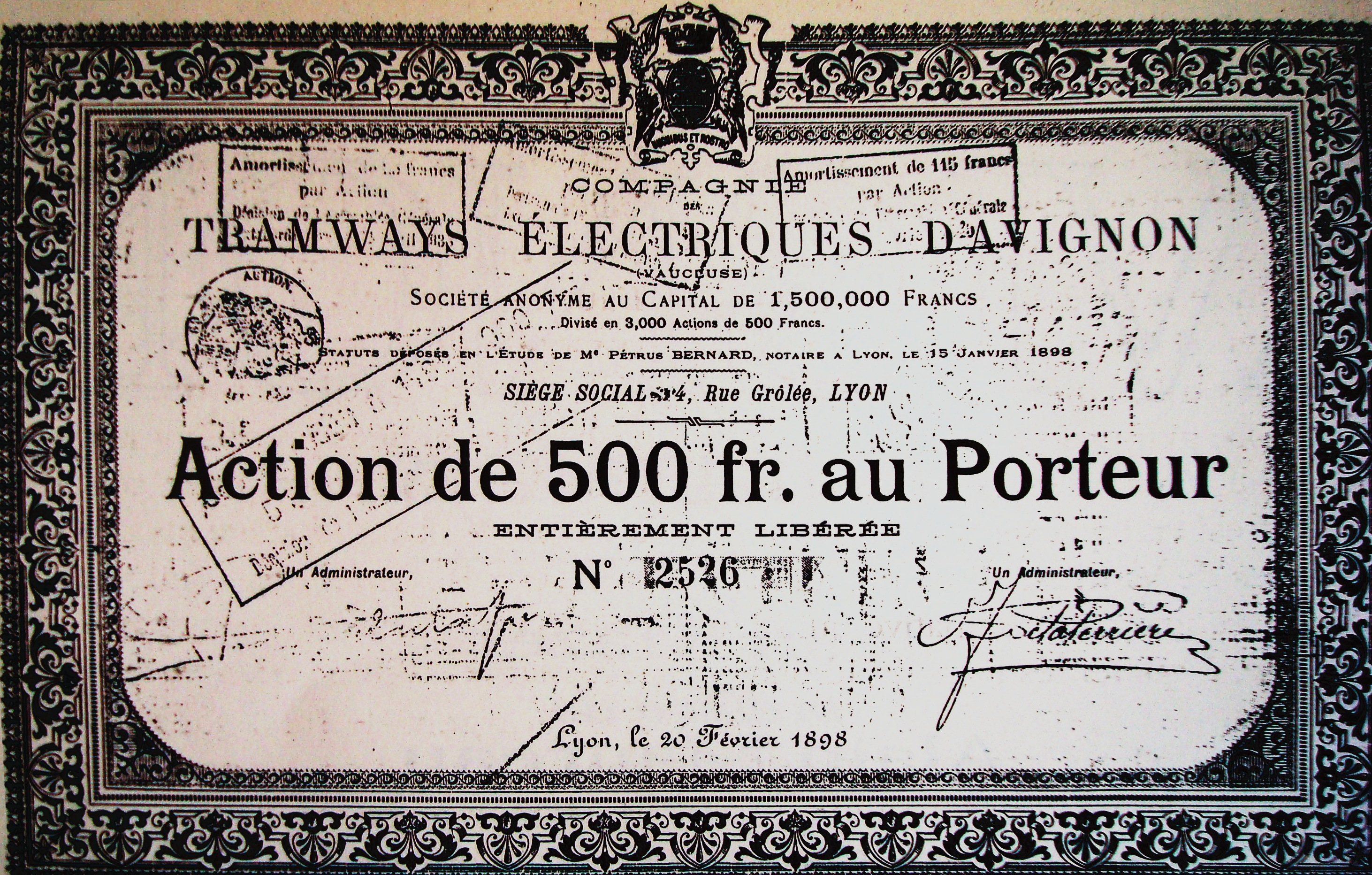 Action de la compagnie des tramways d'avignon